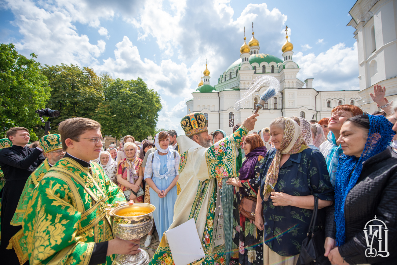 23 июля 2019 года, в день памяти преподобного Антония Печерского, начальника всех русских монахов, Блаженнейший Митрополит Киевский и всея Украины Онуфрий совершил Божественную литургию в Успенском соборе Свято-Успенской Киево-Печерской Лавры.